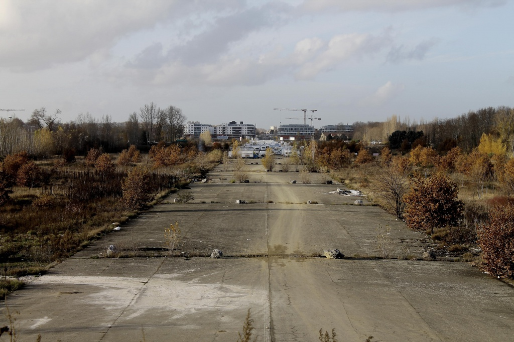 Piste de l'ancien aérodrome de Montaudran en décembre 2012, ZAC d'Aérospace Campus à Toulouse.